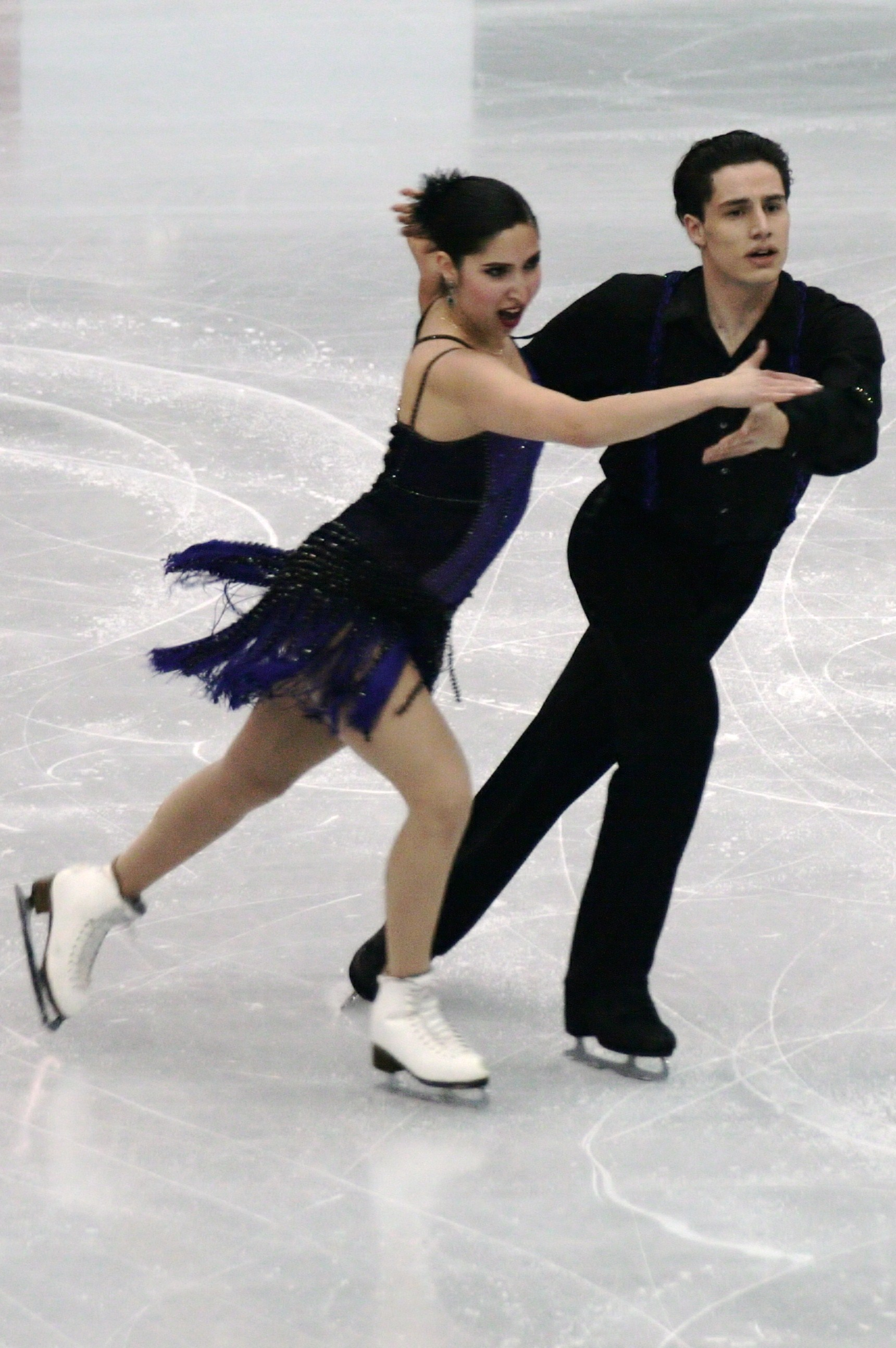 Коренне Брунс и Риан ван Наттен (Мексика) на чемпионате мира по фигурному катанию 2012, предварительный раунд.